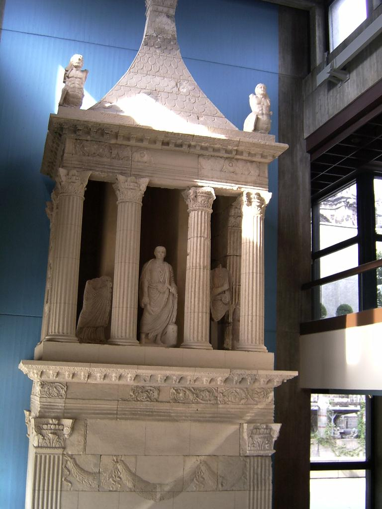 Grabmal des Poblicius um 40 n. Chr., Römisch-Germanisches Museum, Köln.